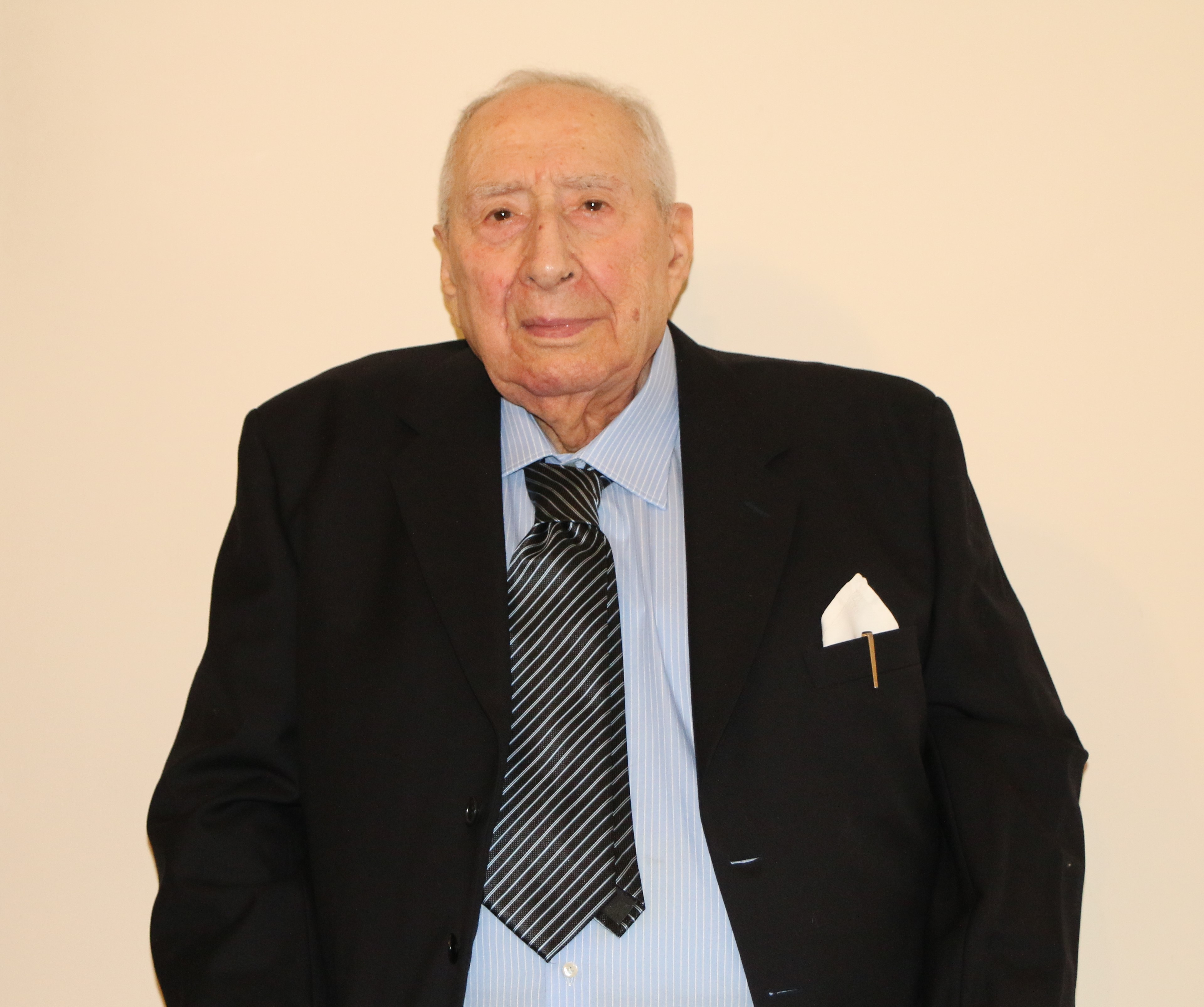 Foto che ritrae il progettista nella sua abitazione